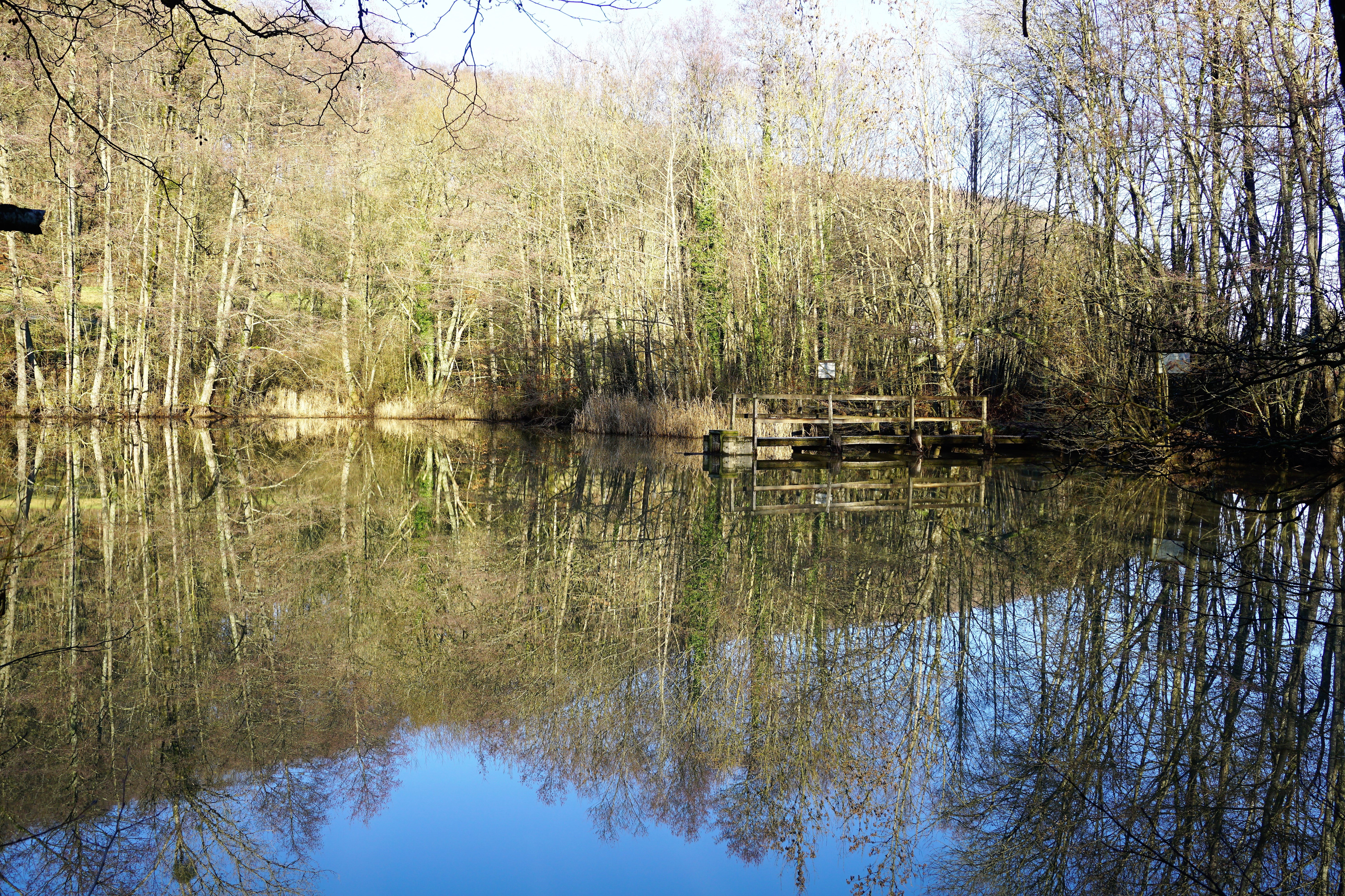 De Kriibseweier (Gemeng Jonglënster) am Gréngewald